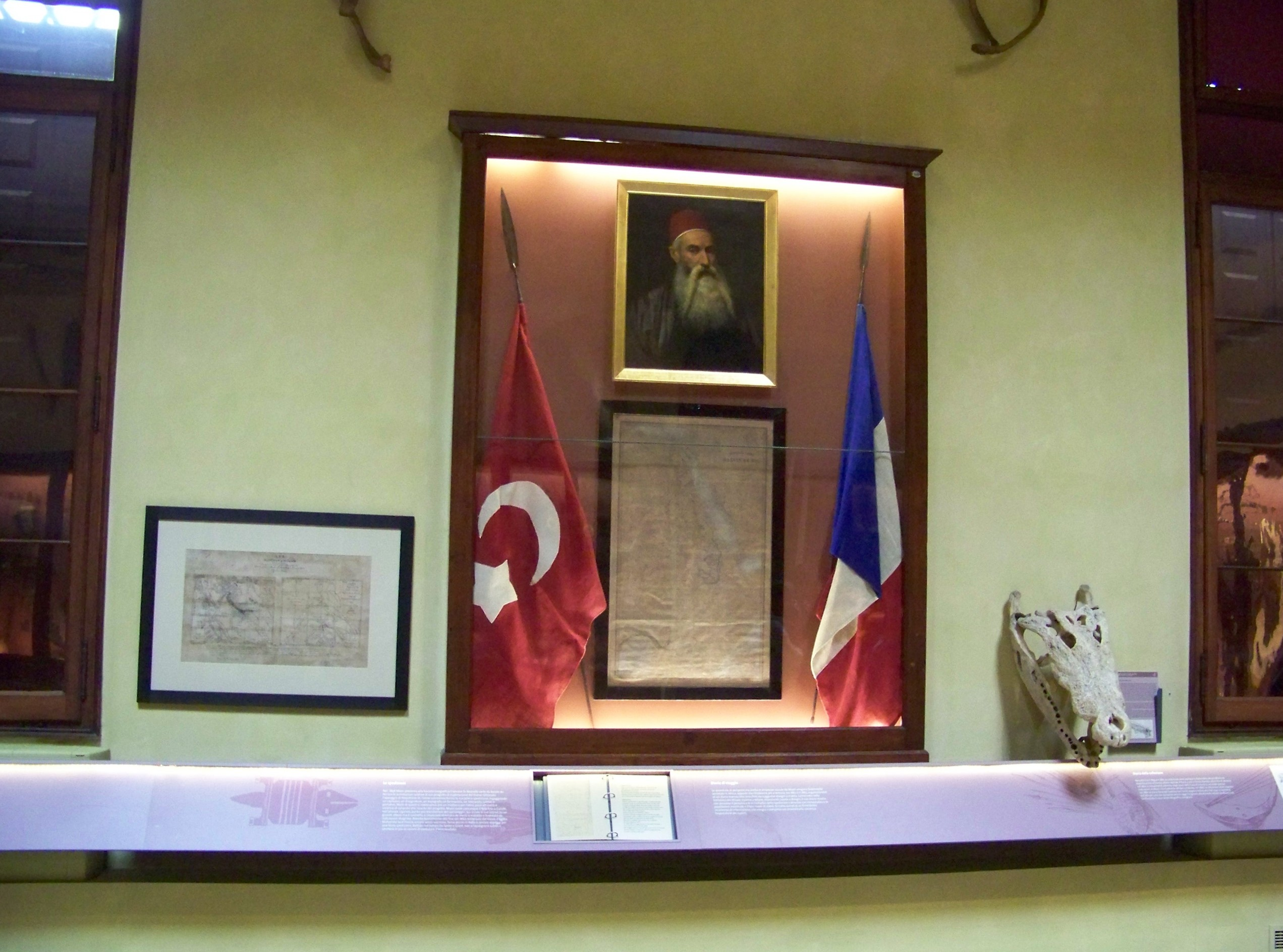 xplorateur italien du XIXème siècle